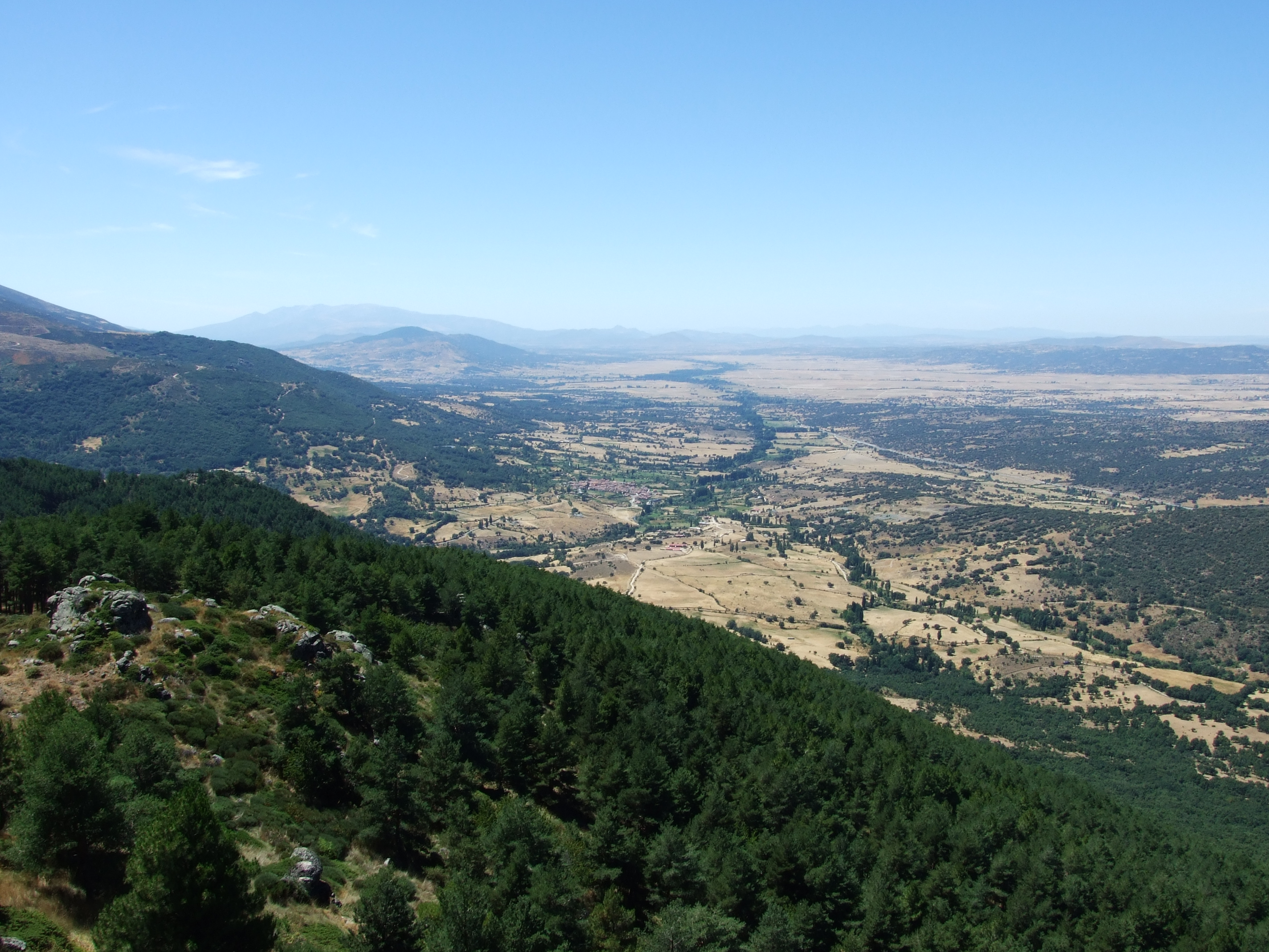 VISTA GENERAL DEL VALLE DEL CORNEJA (AVILA;ESPAÑA)